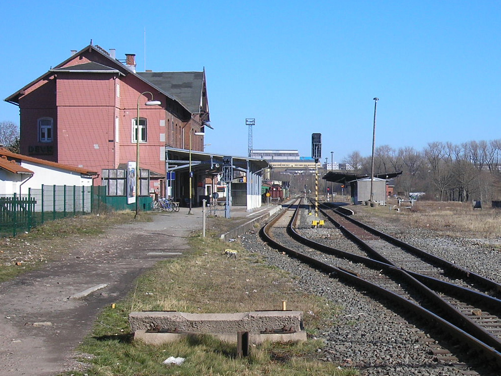 Blick in den Bahnhof von Ilmenau (Thüringen) von Süden.